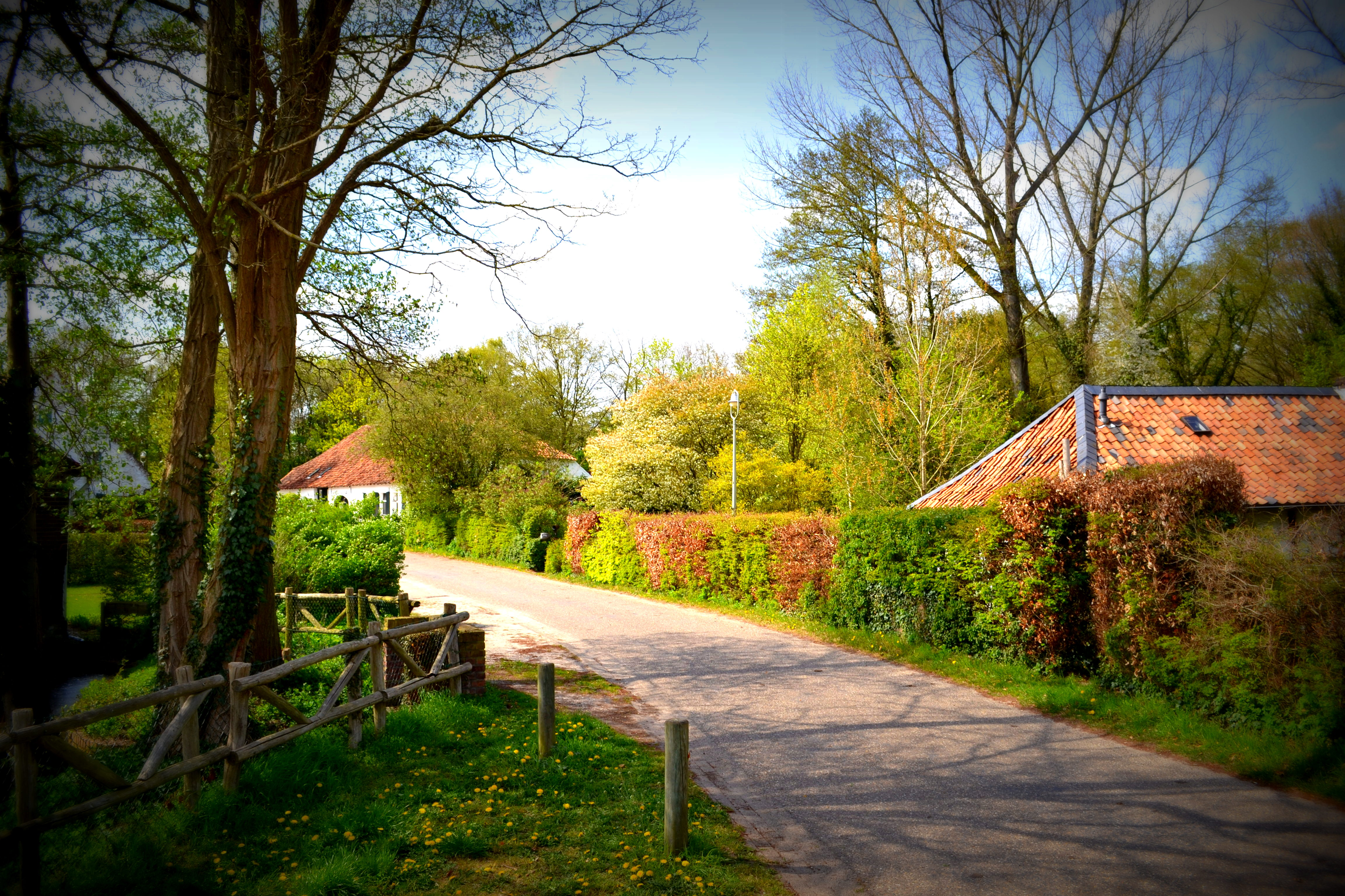 Ronckenstein (gemeente Beesel)